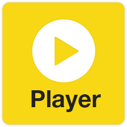 وگو نرم افزار پات پلیر